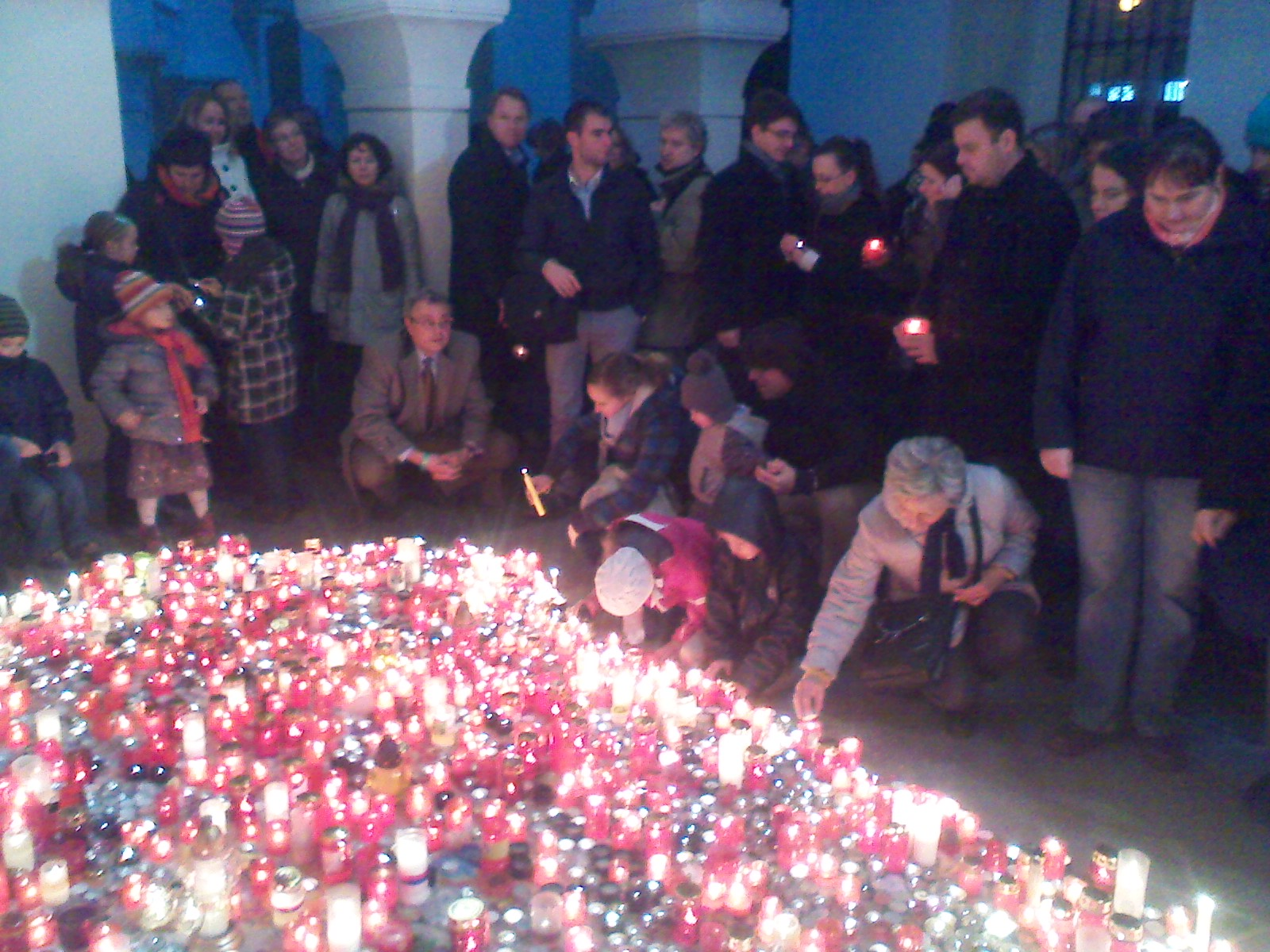 Nezměněná podoba a především funkce veřejného průchodu, v němž stranou shonu hlavní pražské ulice bylo možné zastavit se, zamyslet se, kontemplovat, případně něco ponechat na připomínku a uctění památky – tímto a zároveň svým uspořádáním (bočními sloupy designovaný prostor mimo hlavní průchozí linii) podloubí získalo až sakrální význam.